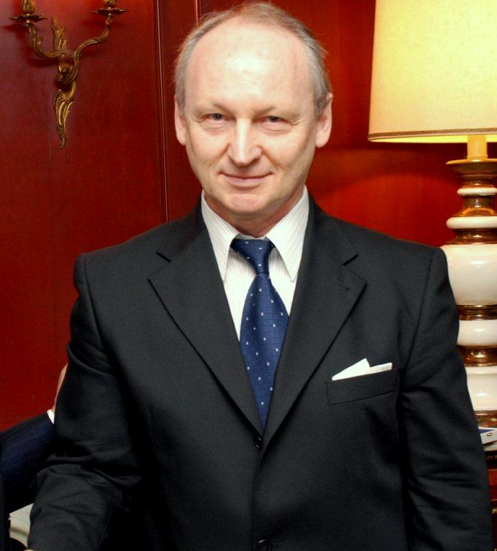 Toivo Tasa, Eesti suursaadik Jaapanis